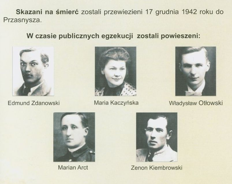 Wystawa w Muzeum Historycznym w Przasnyszu - Skazani na śmierć działacze NSZ, 17 grudnia 1942r. Przasnysz